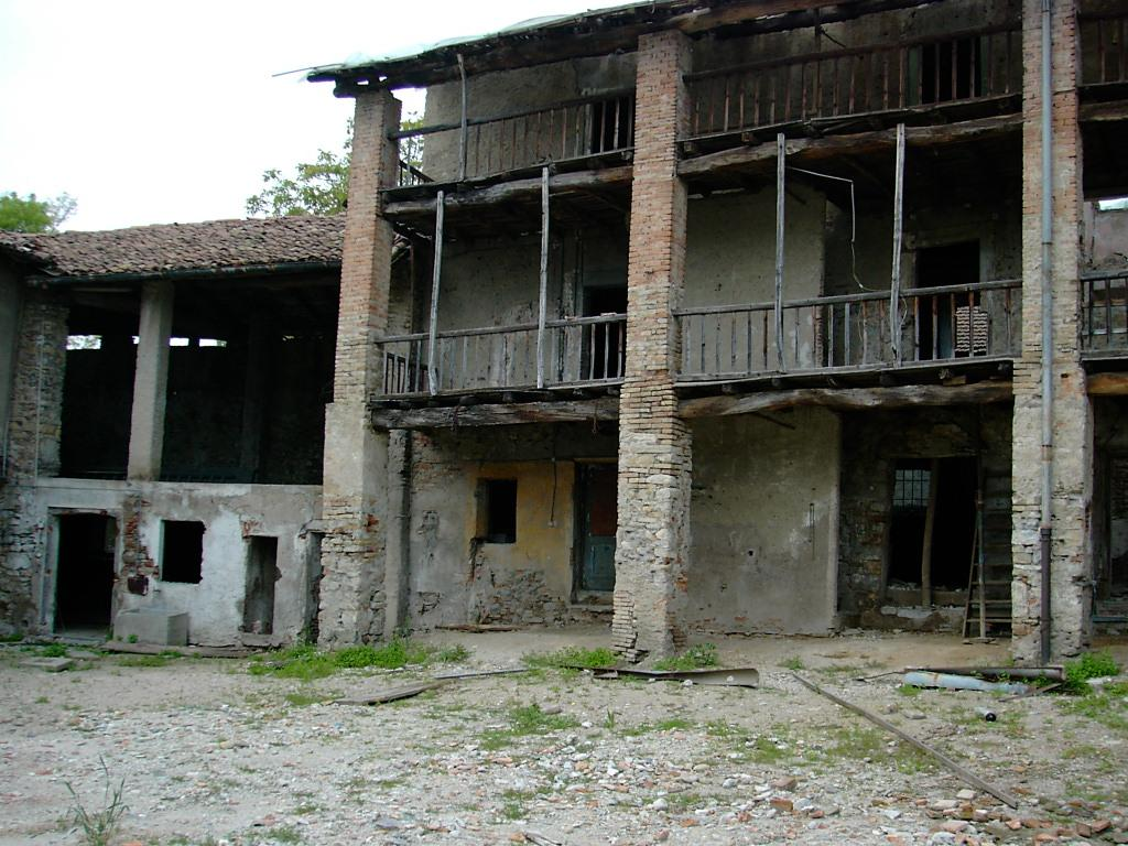 Fattoria Ticinese in Novazzano, La Pobbia di Novazzano ab 2003 auf dem Ballenberg wieder aufgebaut